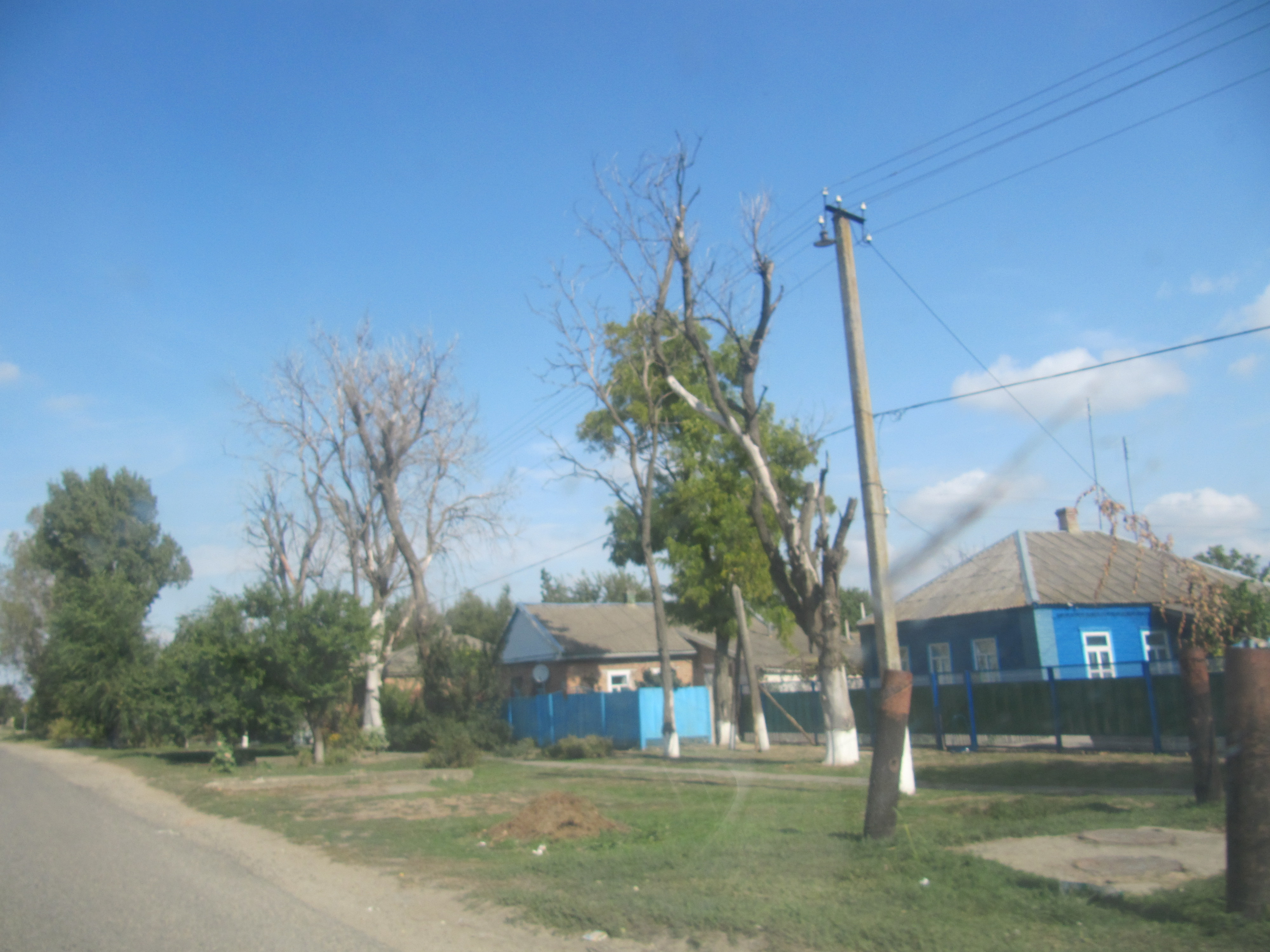 Вид села Тахта, Ипатовский район, Ставропольский край, Россия